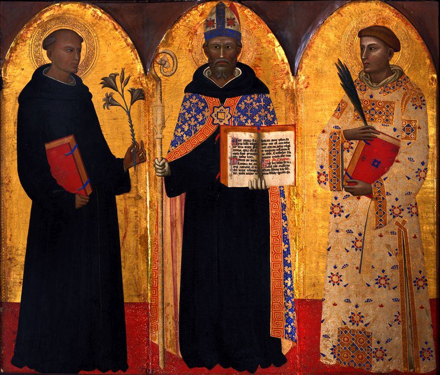 Pinacoteca civica Bruno Molajoli